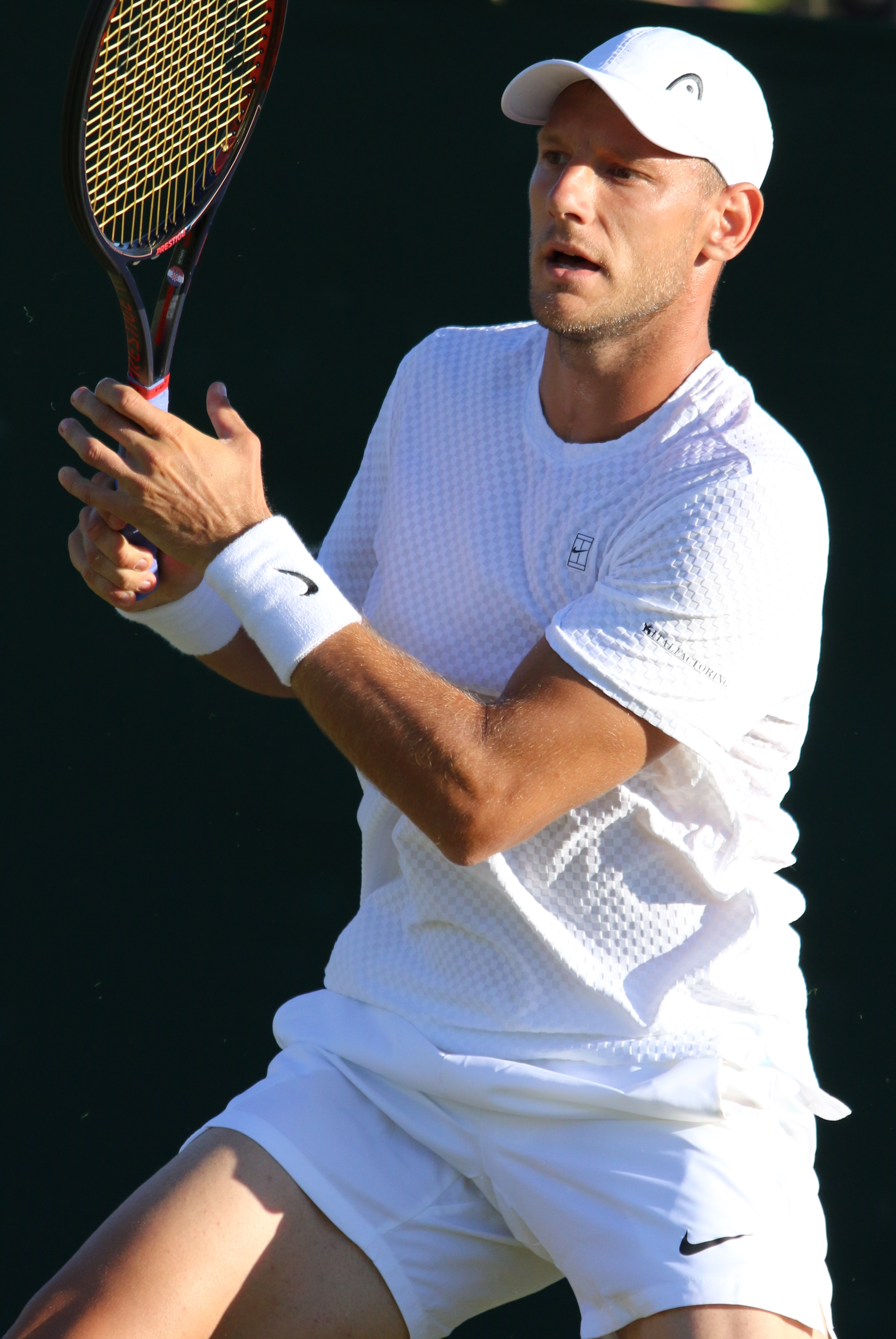 Galovic WMQ18 (18)